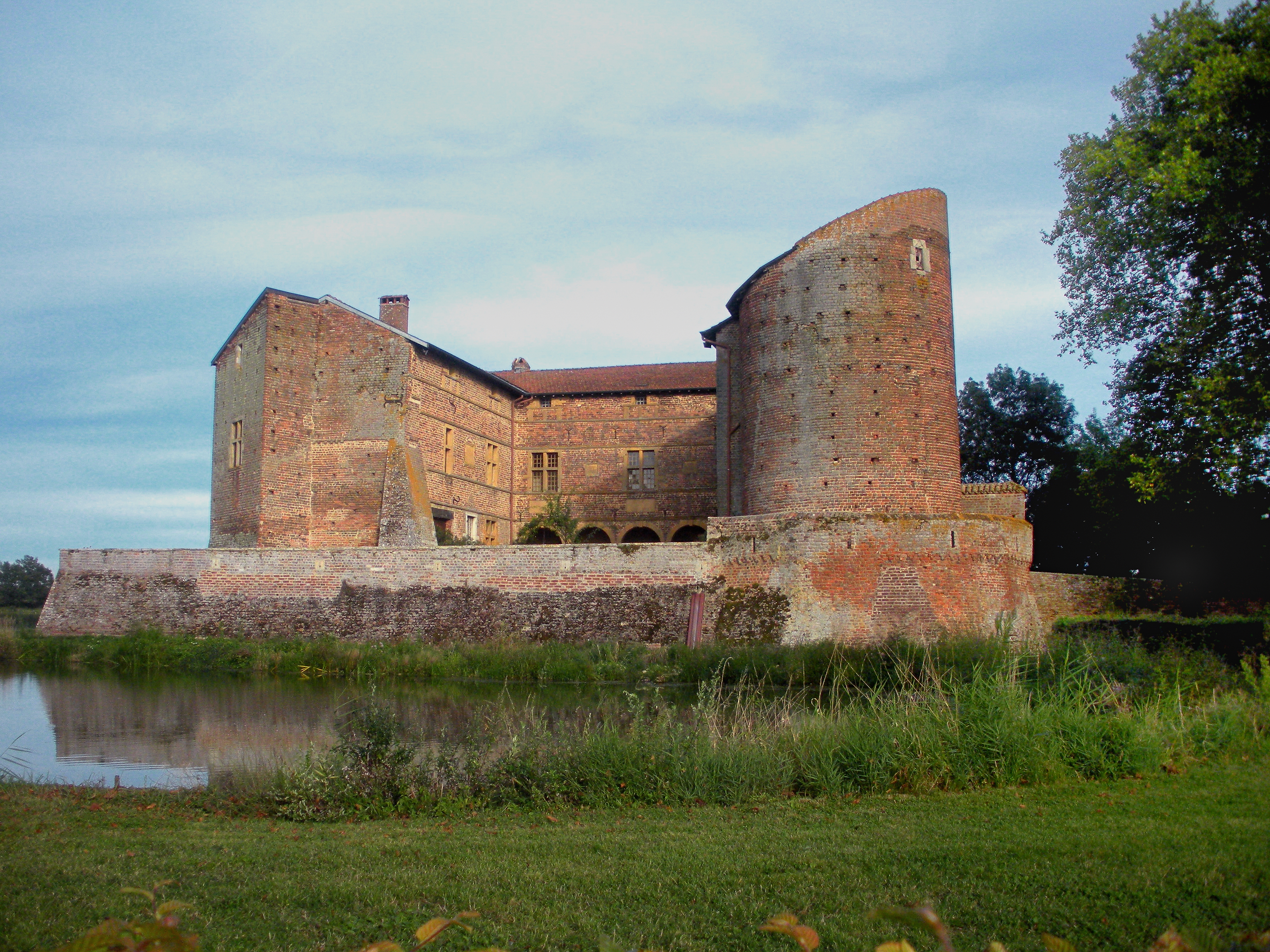 château